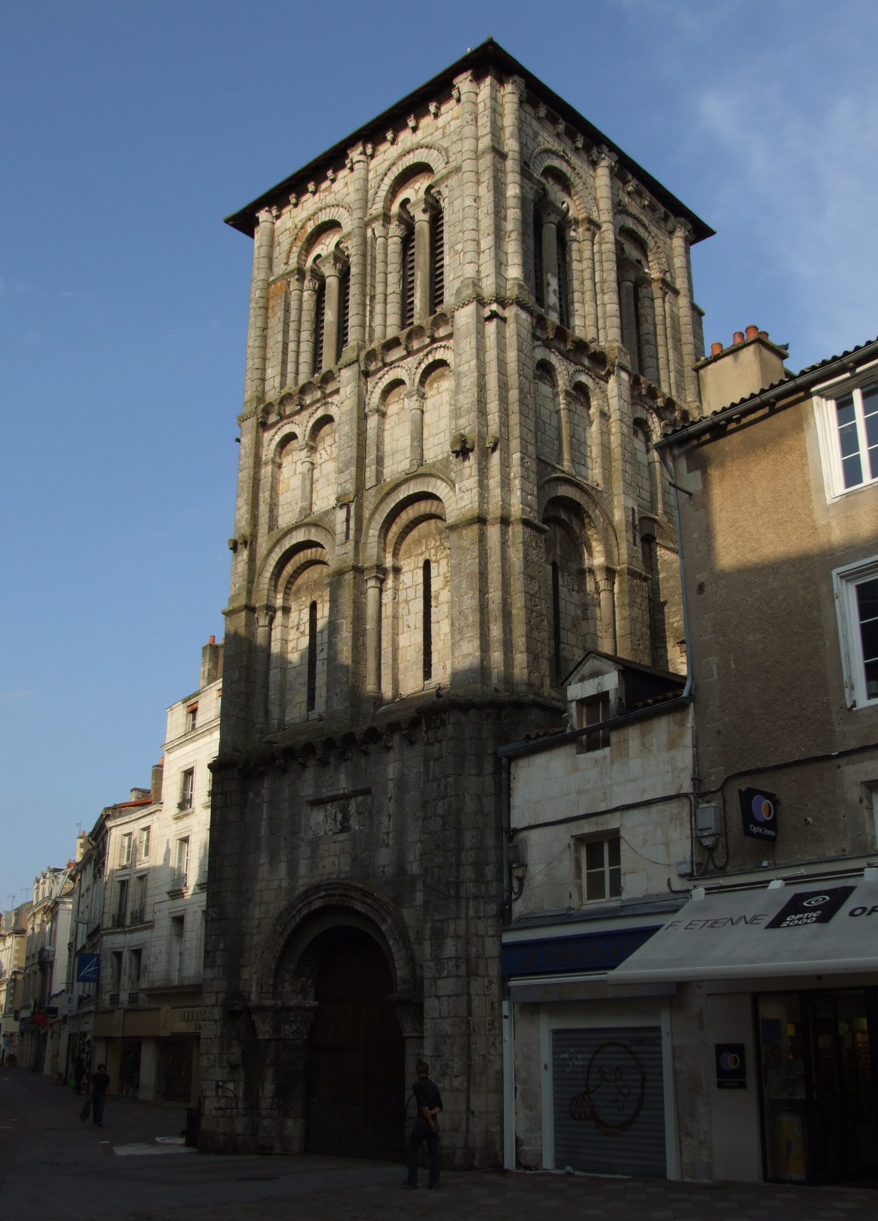 Église Saint-Porchaire, Poitiers, Poitou-Charentes, FRANCE